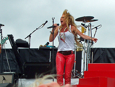 Sanne Salomonsen (født 30. december 1955) er en dansk sangerinde.